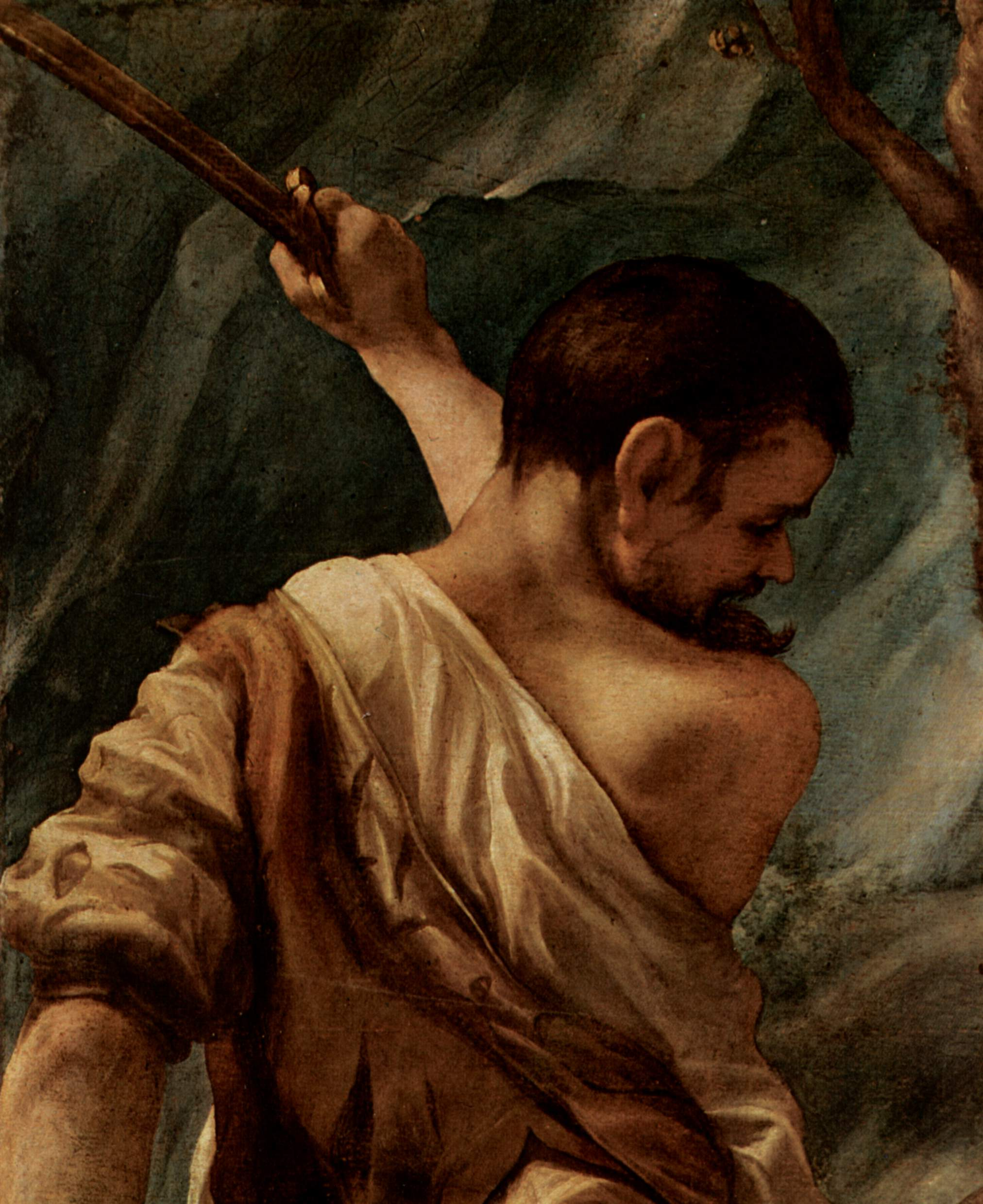 detail